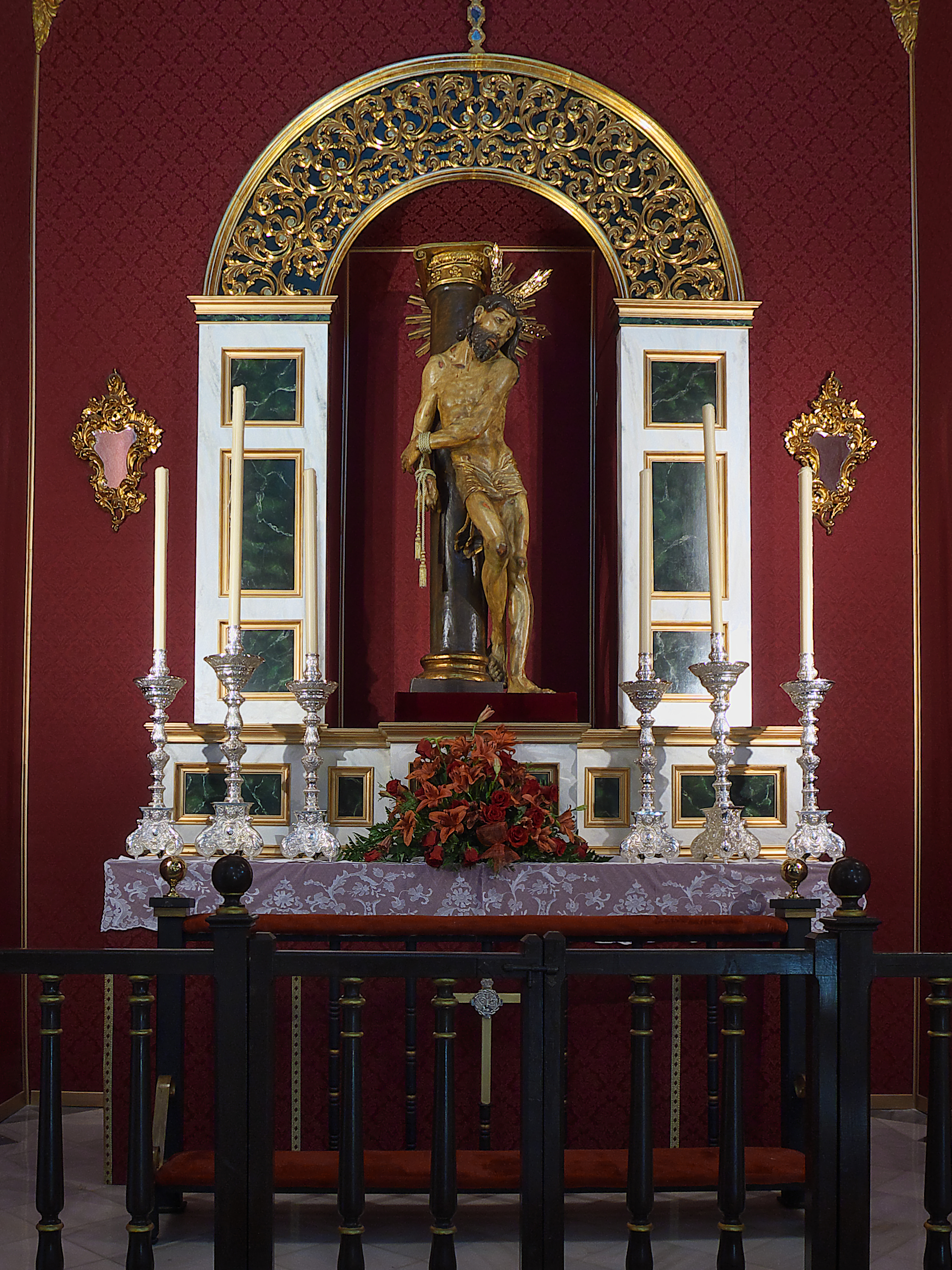 Titular de la Real, Venerable e Ilustre Cofradía de Nuestro Padre Jesús del Perdón y María Santísima de la Aurora. San Miguel Bajo (Albayzín). Talla de Diego de Siloé.